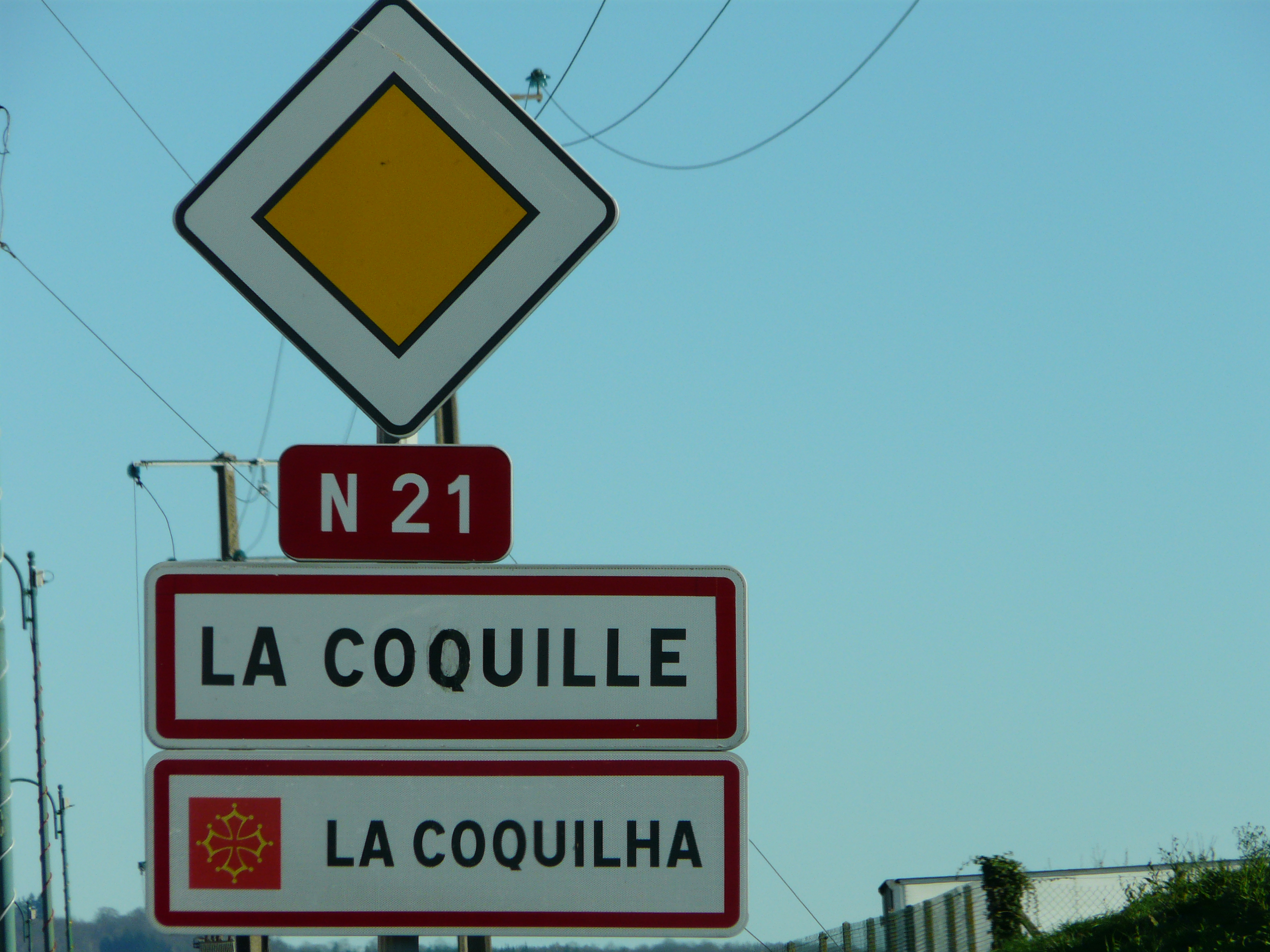 Panneau d'entrée dans le bourg de La Coquille sur la route nationale 21, Dordogne, France.